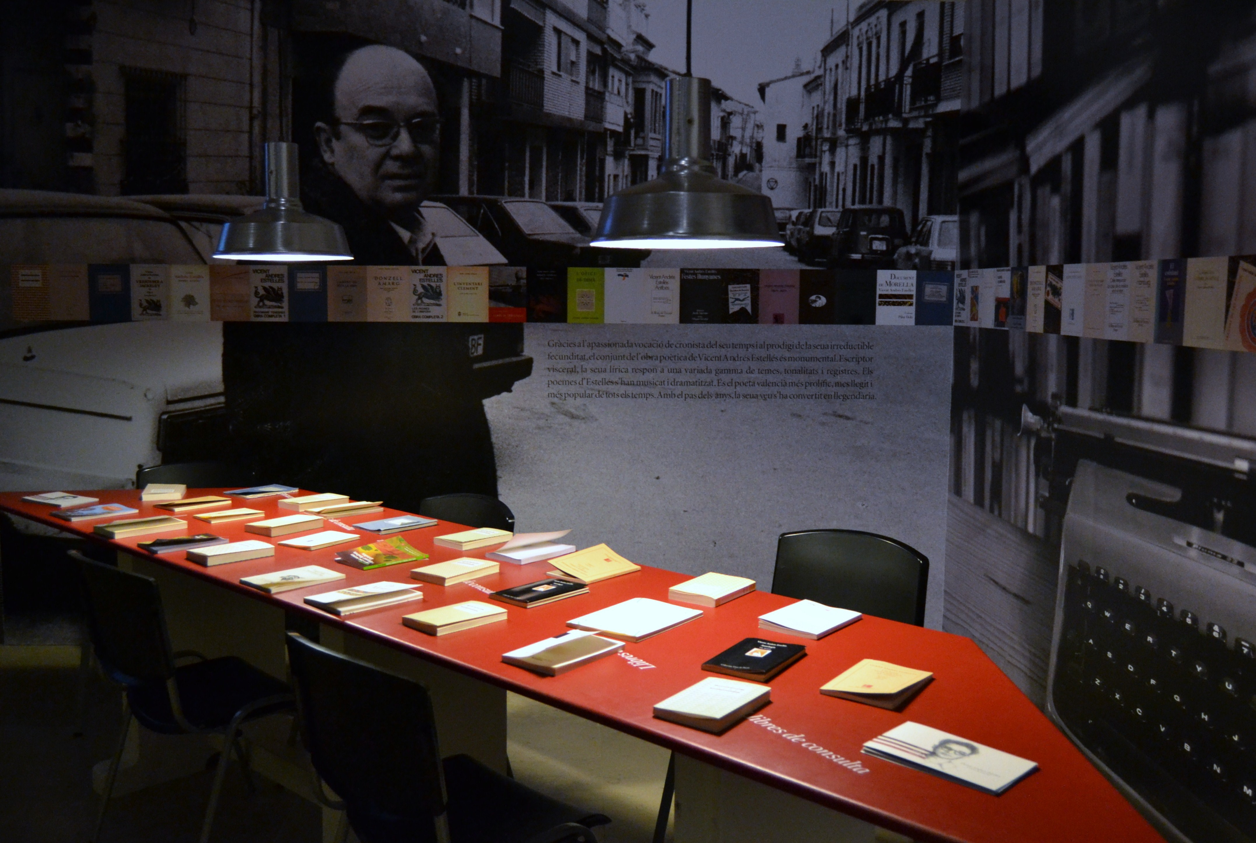 Exposició de Vicent Andrés Estellés, llibres.